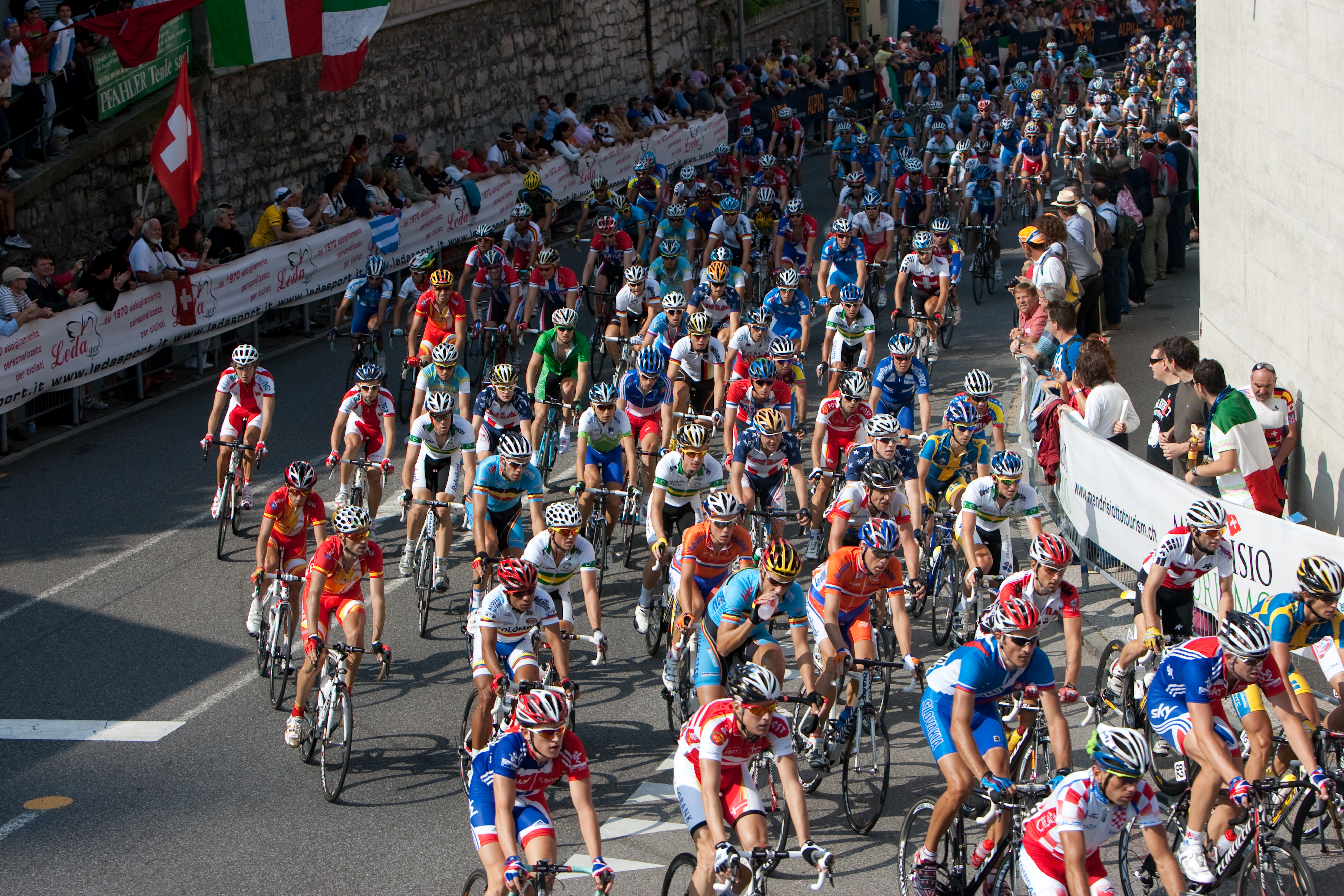 Épreuve élite, le peloton aux championnats du monde de cyclisme à Mendrisio en 2009.